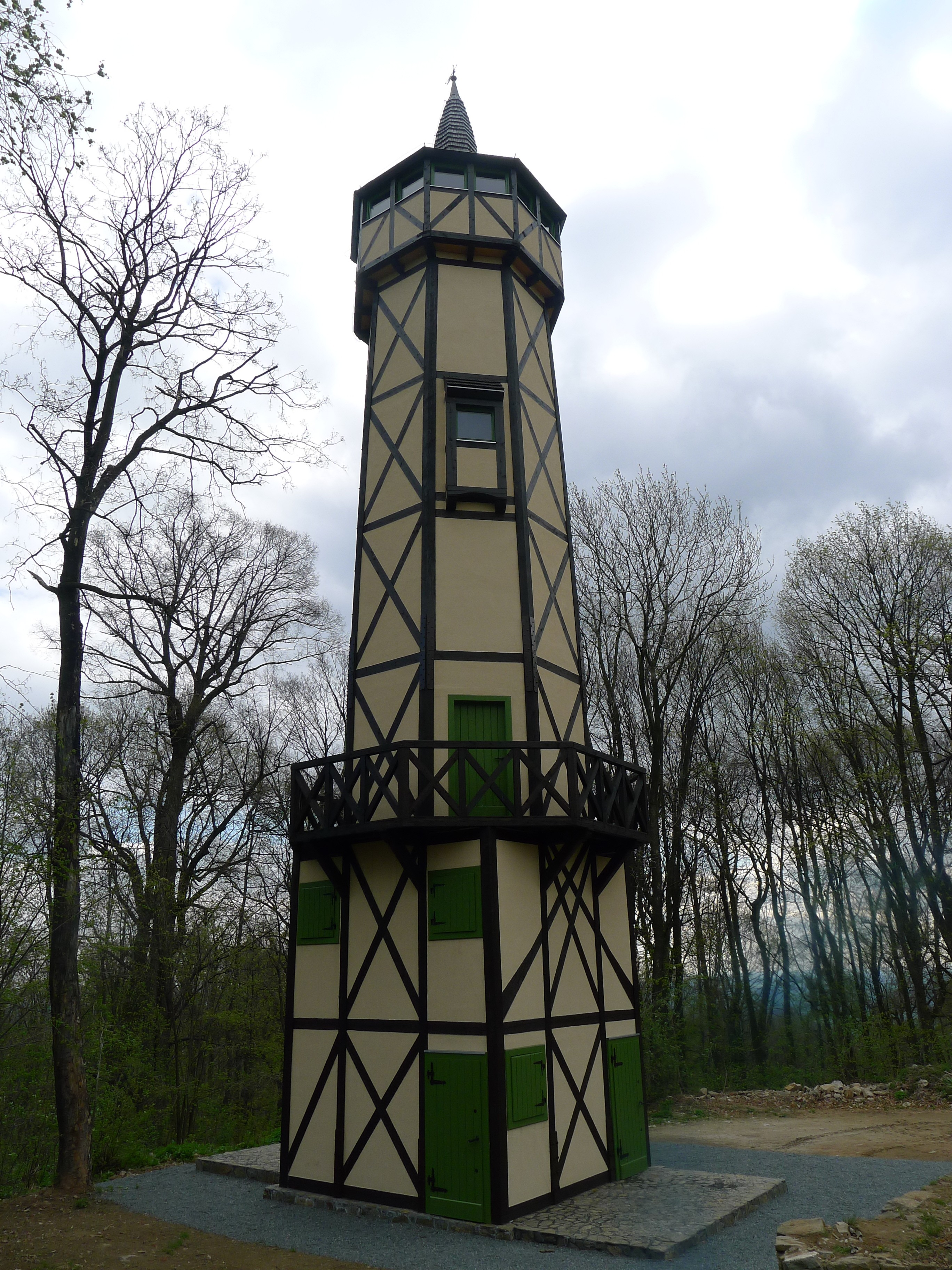 Wieża widokowa na górze Gromnik, oddana do użytkowania w 2012r. Projekt Maciej Małachowicz, Rafał Karnicki. Stanowi ona, obok projektu ekspozycji reliktów murów i projektu zagospodarowania turystycznego wzgórza, element trasy turystycznej prowadzącej przez Wzgórza Niemczańsko-Strzelińskie. Za sprawą mediów, powszechnie jest znana jako "wieża widokowa bez widoku"... z wieży rozpościera się widok na odsłaniane w toku prac archeologicznych leżące u podnóża założenie zamkowe. W okresie lipcowych wycieczek warto zajrzeć na szczyt aby móc z bliska przyjrzeć się prowadzonym pracom.